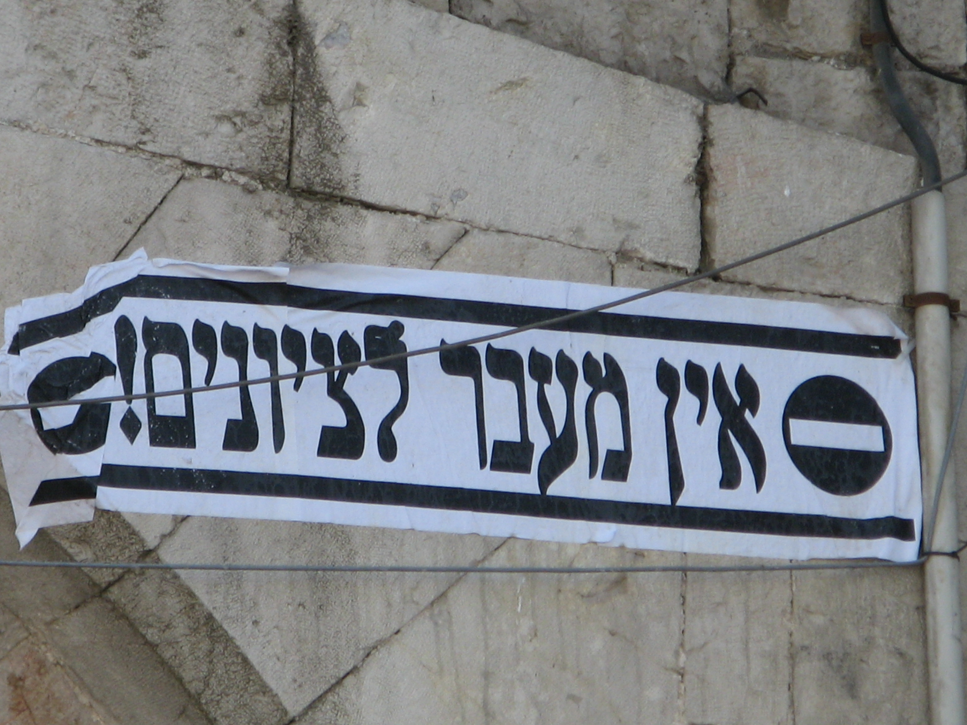 Jérusalem - quartier de Méa Shéarim - une affichette indiquant אין מעבר לציונים "interdit aux sionistes!"